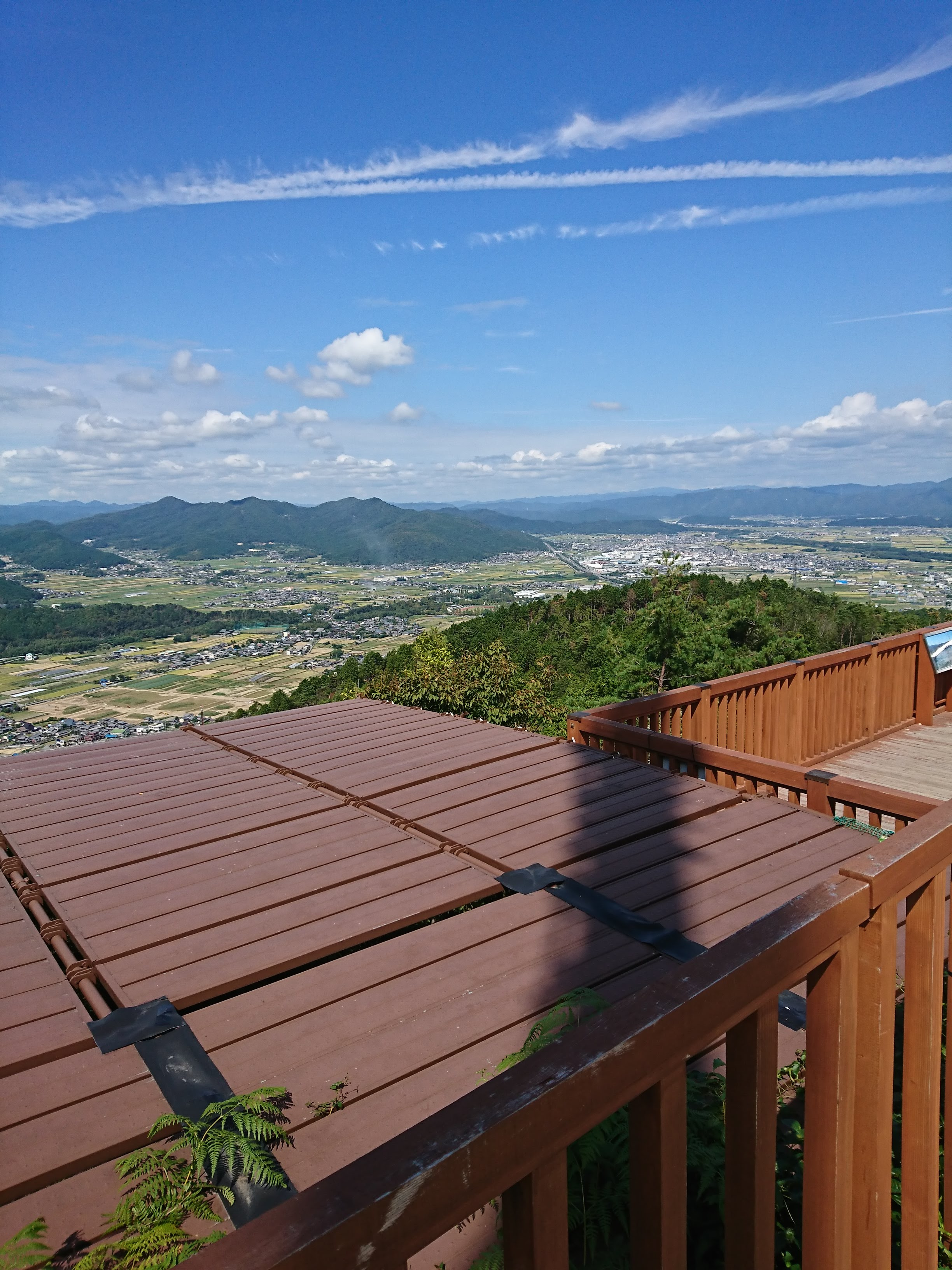 竜ケ尾山 山頂近くにあるかめおか霧のテラスからの展望。手すりの向こうはパラグライダー発進場。